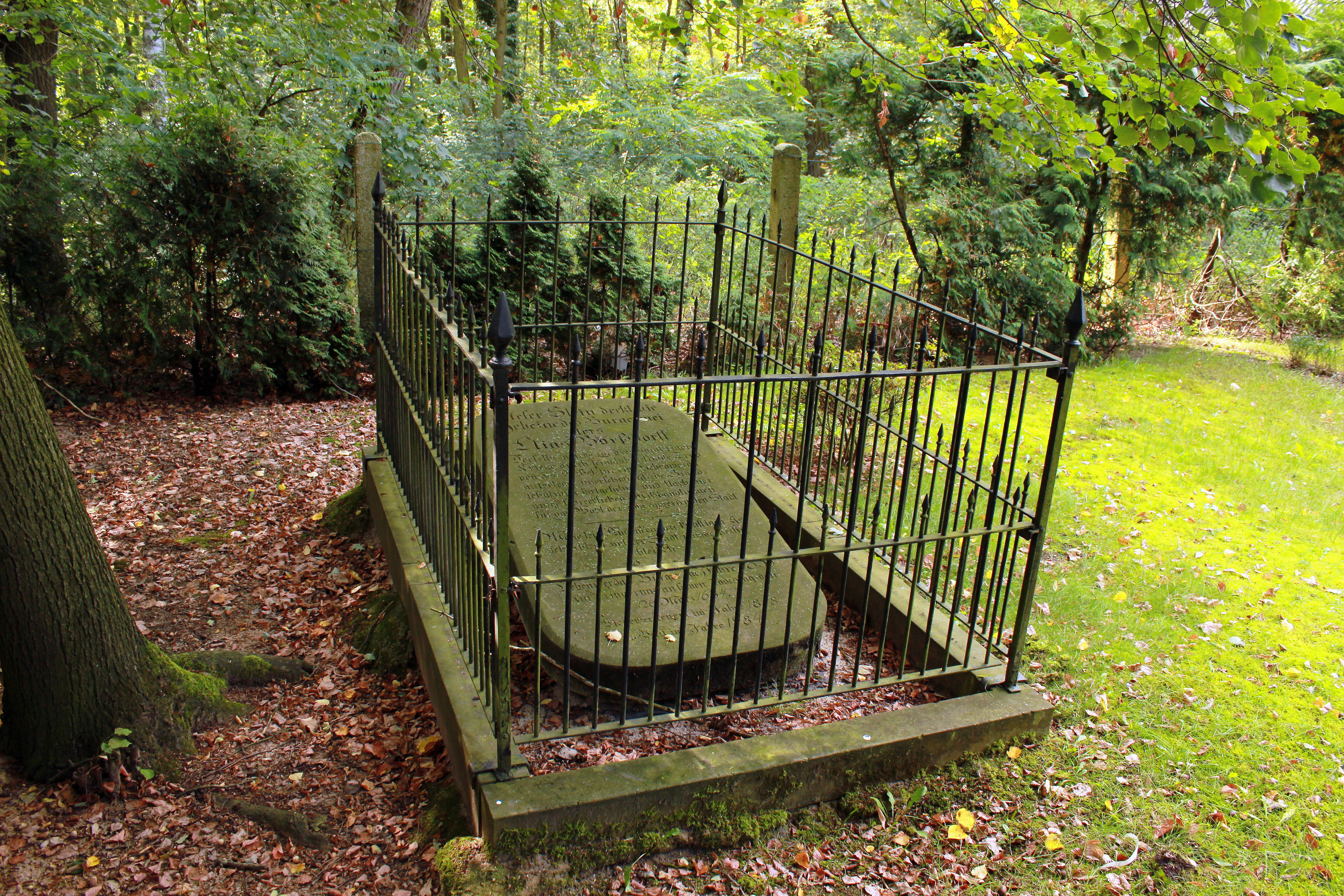 Das unter Denkmalschutz stehende Grab von Elias Borßdorff in Zeischa.